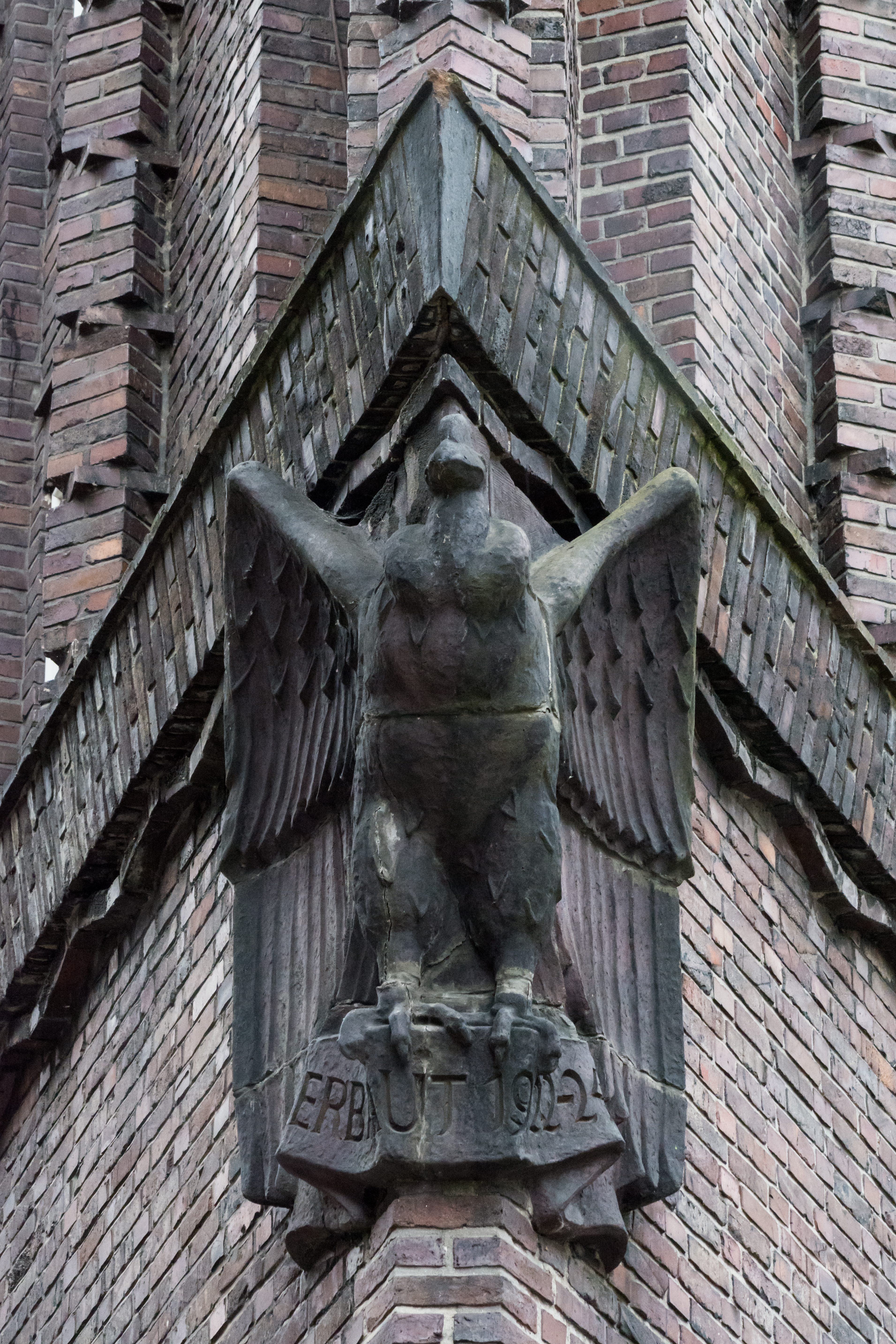 Fassadendetail am Chilehaus in Hamburg-Altstadt. This is a photograph of an architectural monument.